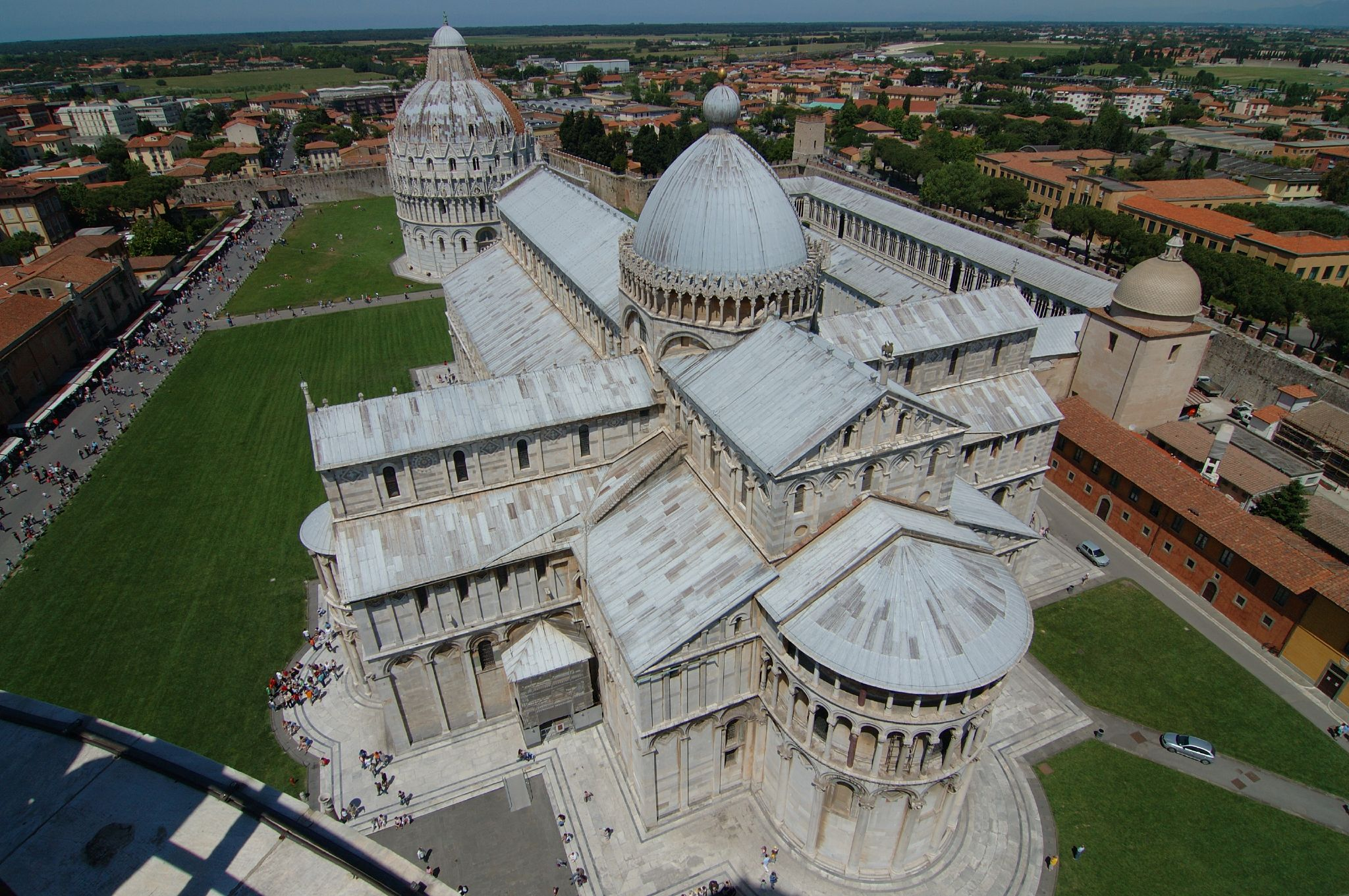 Pisa, Toscana, ItaliaDuomo e Battistero dalla Torre